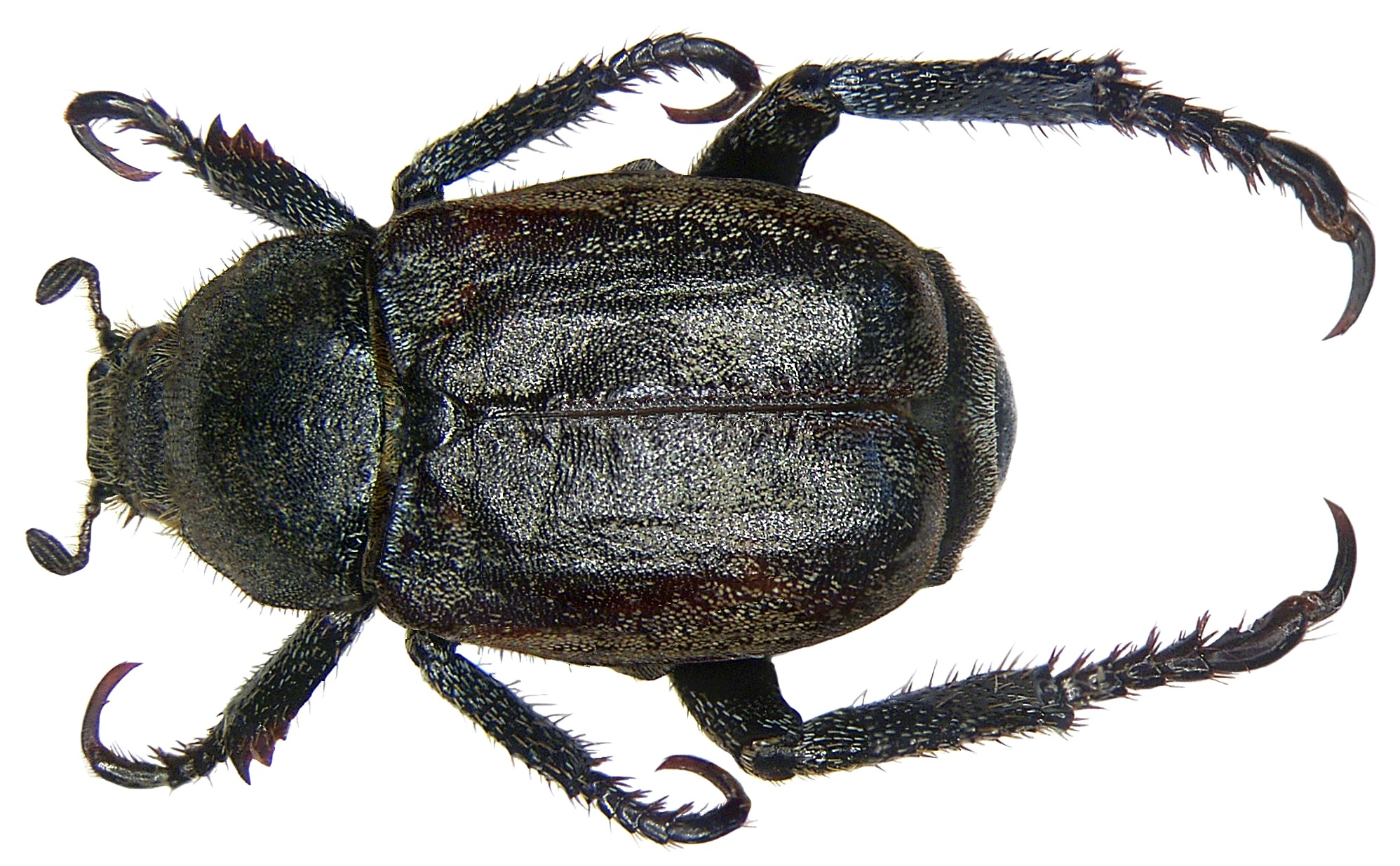 Familie: Scarabaeidae Groesse: 8-9 mm Verbreitung: West-und Mitteleuropa Fundort: Germania, Bayern, Oberfranken, Kulmbach leg.det. U.Schmidt, 1974 Foto: U.Schmidt, 2005